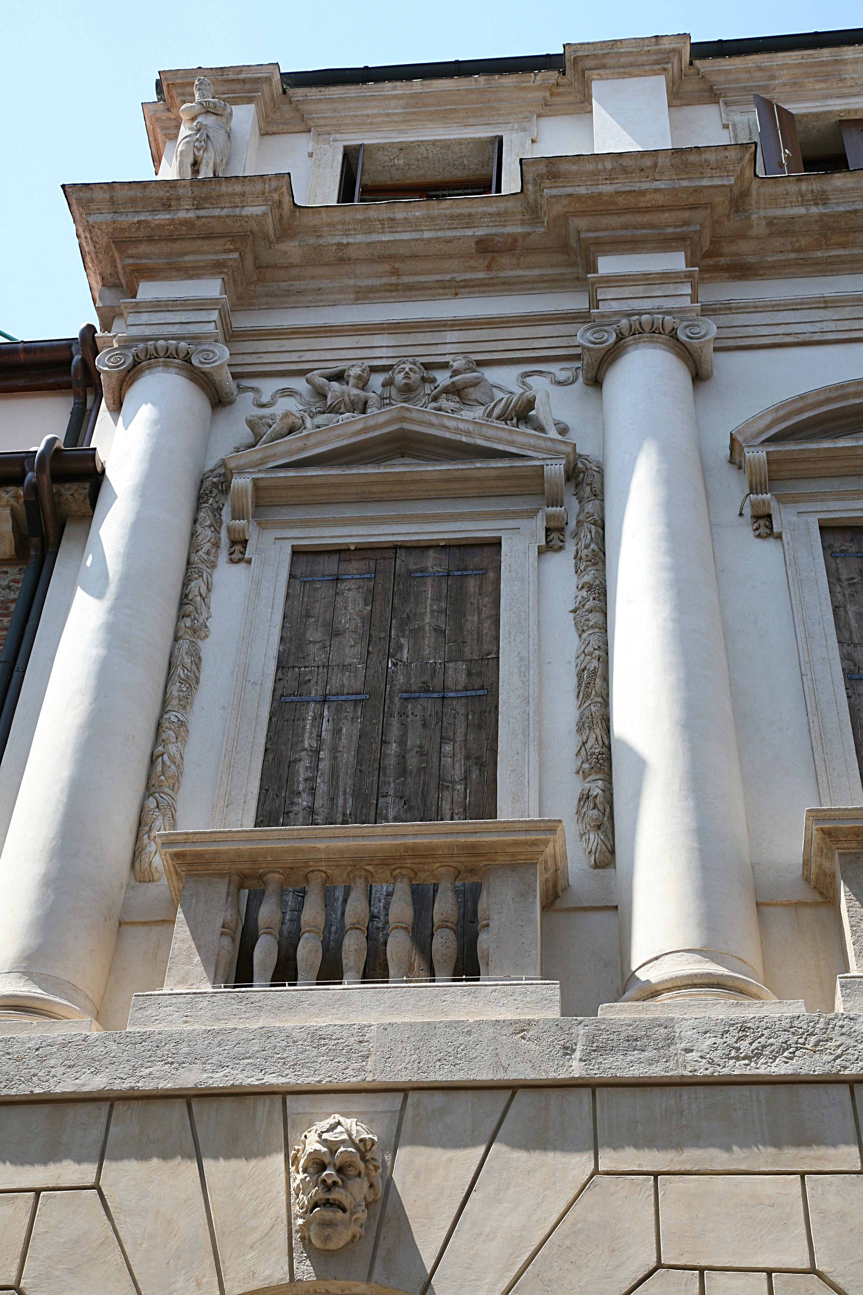 Palazzo Porto in Vicenza